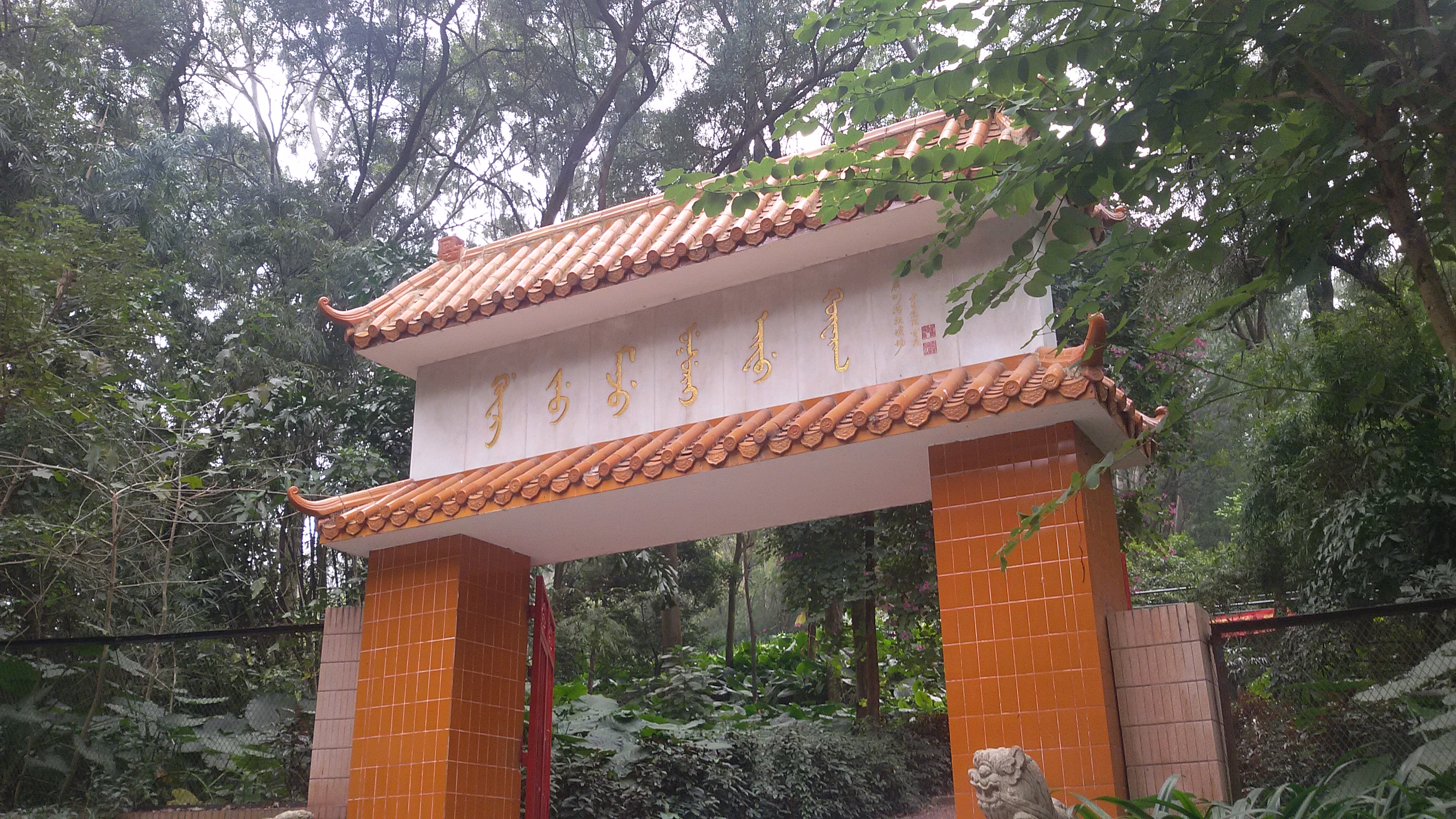 粵語: 廣州滿族墳場 ᠮᠠᠨᠵᡠ: ᠭᠤᠸᠠᠩ ᠵᠧᠦ ᠮᠠᠨᠵᠤ ᠦᠨᠳᠦᠰᠦᠲᠡᠨ ᠪᠤᠯᠠᠰᠢ ᠶᠢᠨ ᠭᠠᠵᠠᠷ